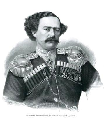 Kniaz' Zakharii Gul'batovich Chavchavadze, Polkovnik, Komandir Dagestanskago Konnago Irreguliarnago polka.